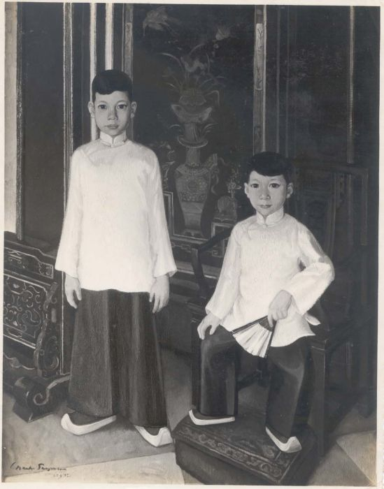 Foto. Portret van Yan en Coen K., kleinkinderen van Khouw Kim An, Majoor der Chinezen van Batavia, 23 september 1937, olieverfschildering door Charles Sayers